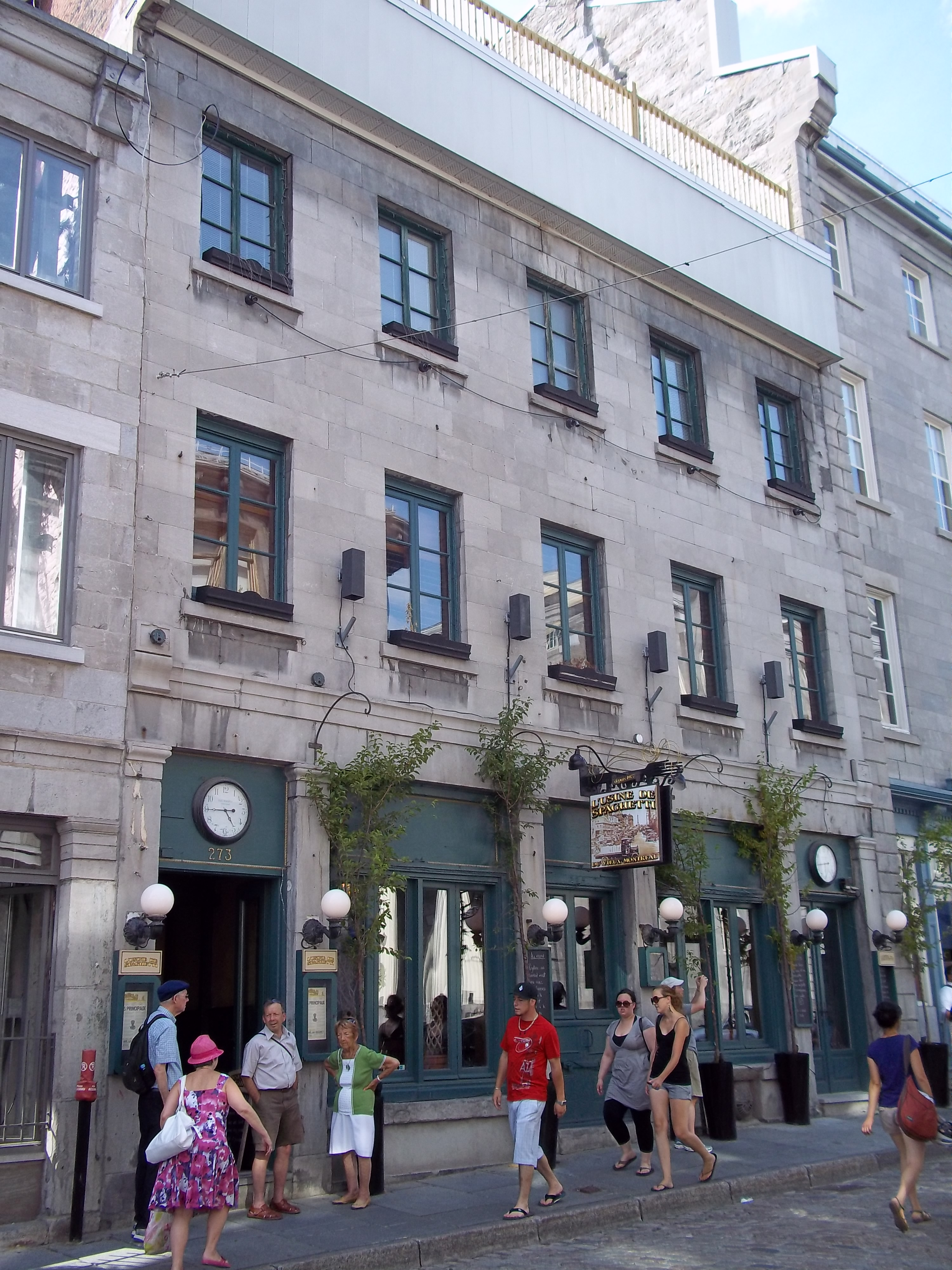 Maison Hubert-Paré, 273 rue Saint-Paul est, Montréal info